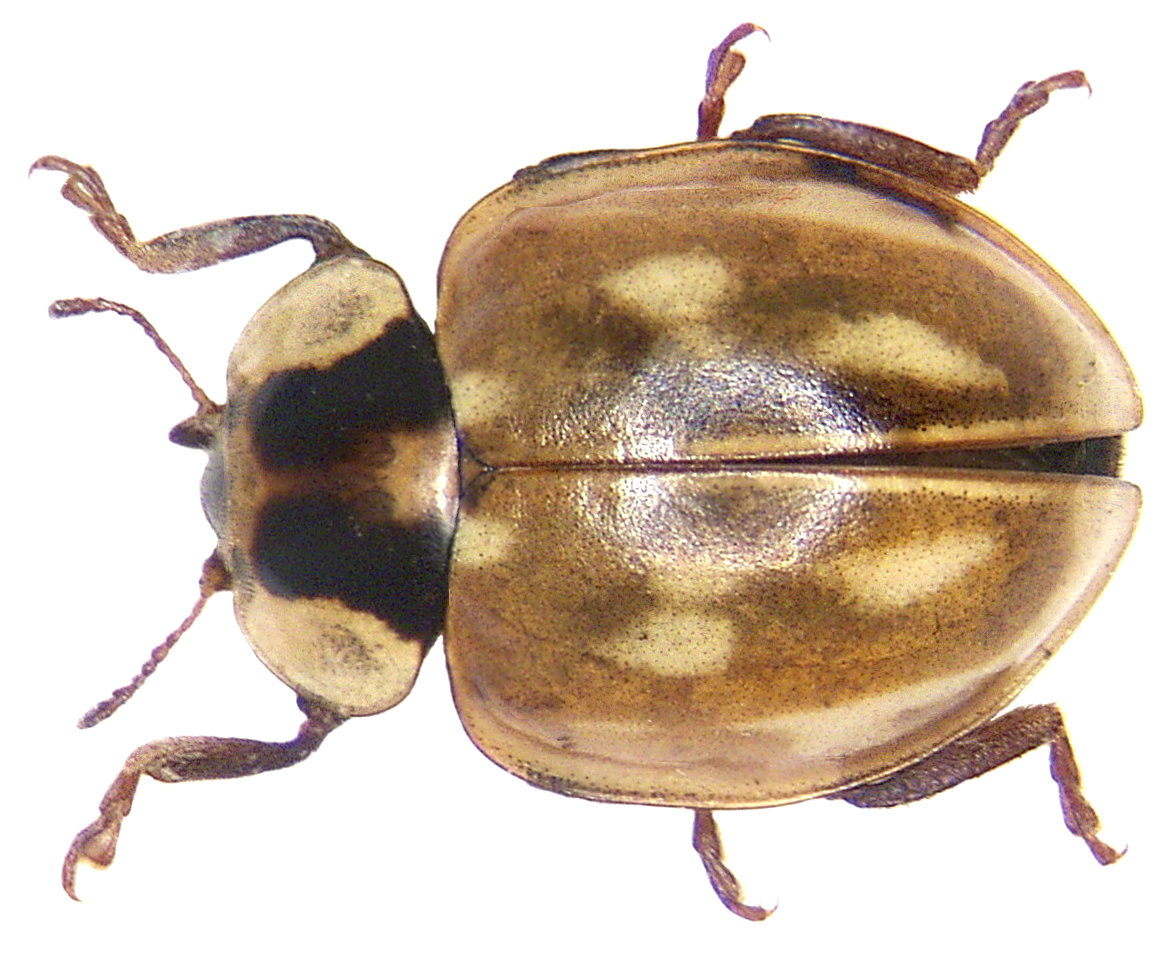 Myzia oblongoguttata (Linné, 1758) Familie: Coccinellidae Grösse: 7-9 mm Verbreitung: Europa Ökologie: in Nadelwäldern besonders auf Kiefern häufig Fundort: Germania, Bayern, Oberfranken, Kulmbach leg.det. U.Schmidt, 1972 Foto: U.Schmidt, 2006